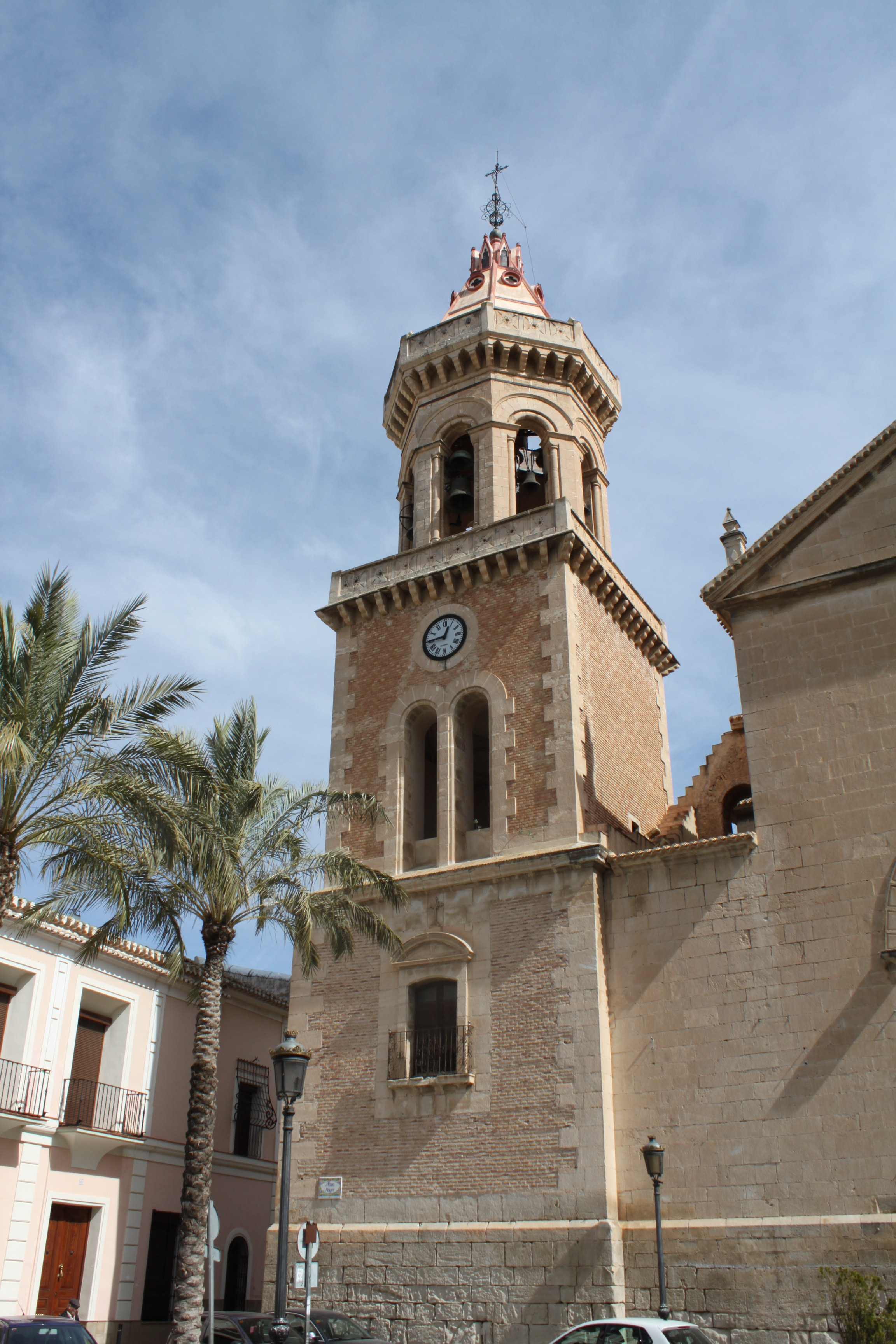 Detalle de la torre de la Basílica de la Asunción en Cieza (Región de Murcia, España).